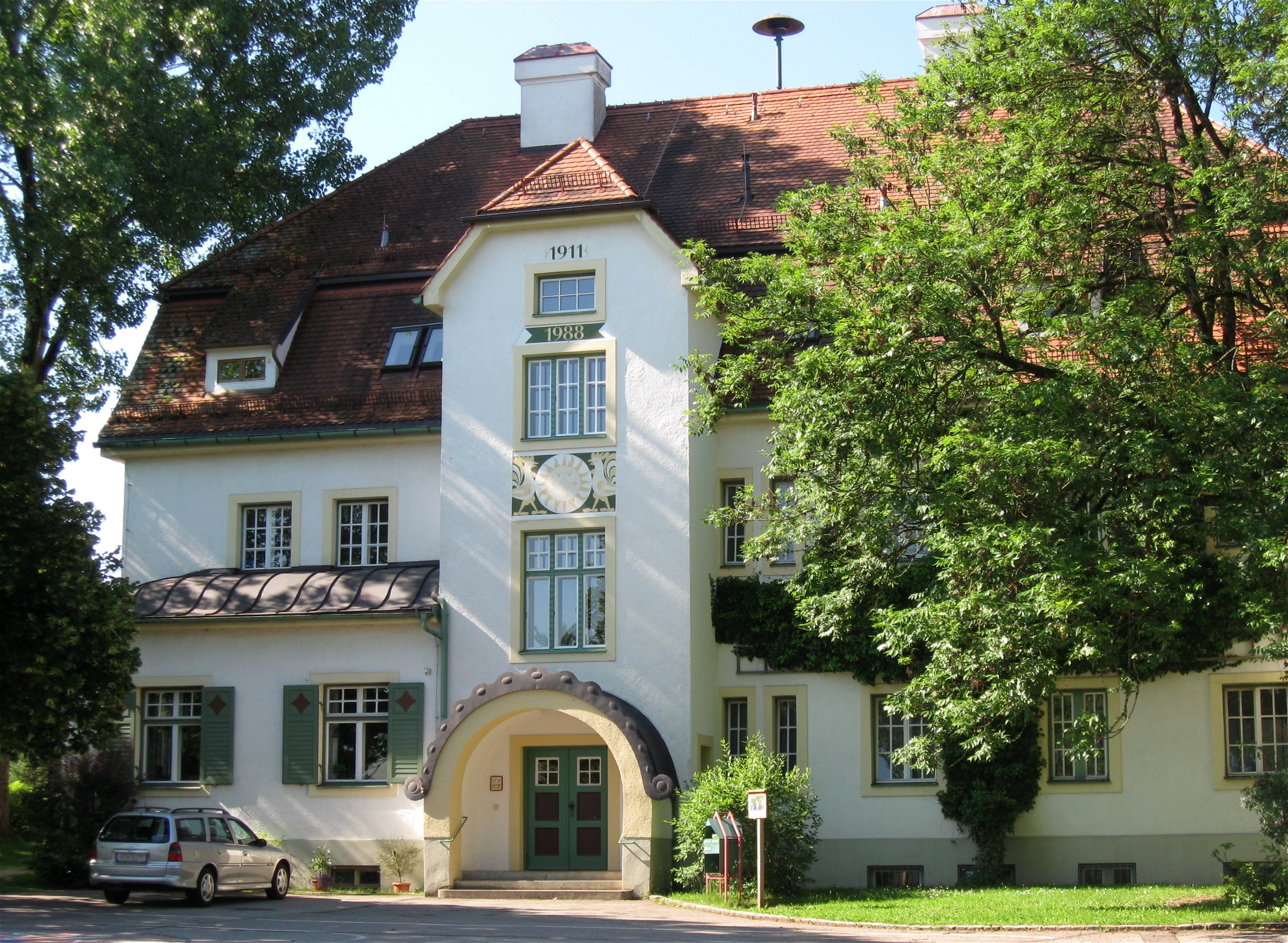 Oberhaching; Kirchplatz 12; Schulhaus, im Stil des reduzierten Historismus, mit Halbwalmdach, 1911